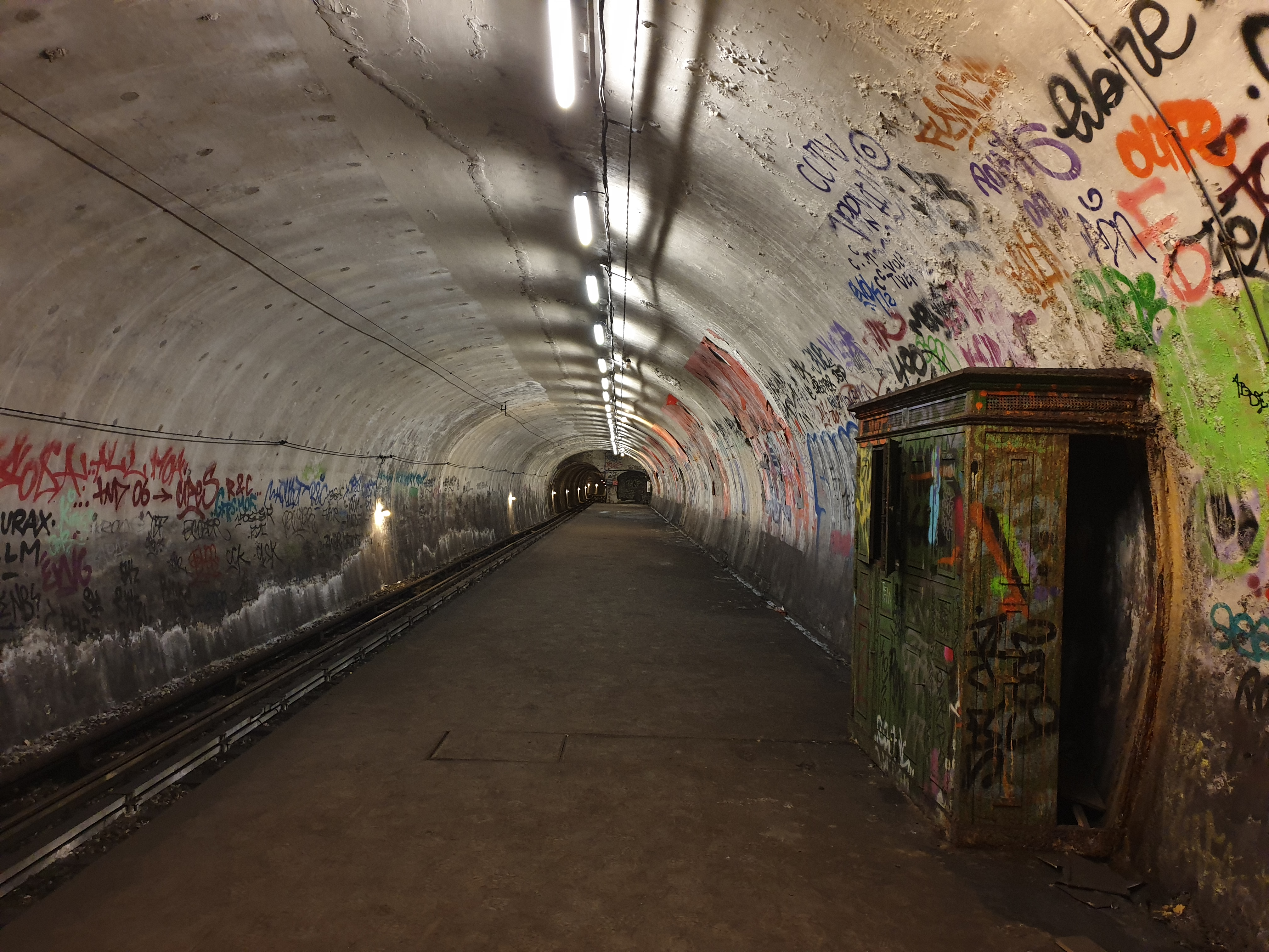 Haxo, station fantôme située entre les lignes 3bis et 7bis du métro de Paris.